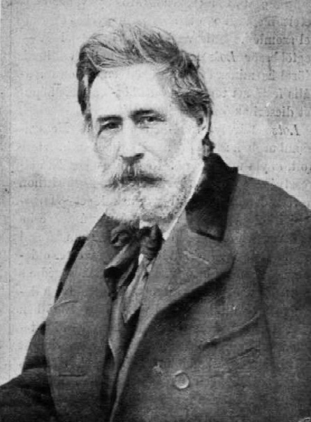 Lotz Károly (1833–1904) festőművész portréja. Strelisky fényképfelvétele